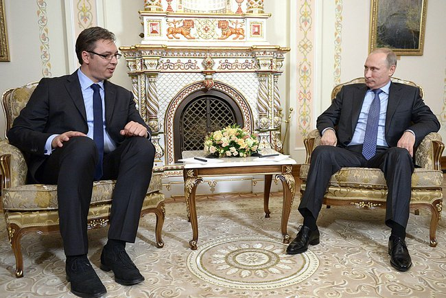 Владимир Путин встретился с Председателем Правительства Республики Сербия Александром Вучичем, который находится в России с рабочим визитом.